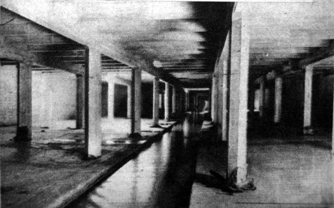 Vista del Arroyo Maldonado, entubado por la Siemens-Schuckert a partir de 1929. Buenos Aires, Argentina.